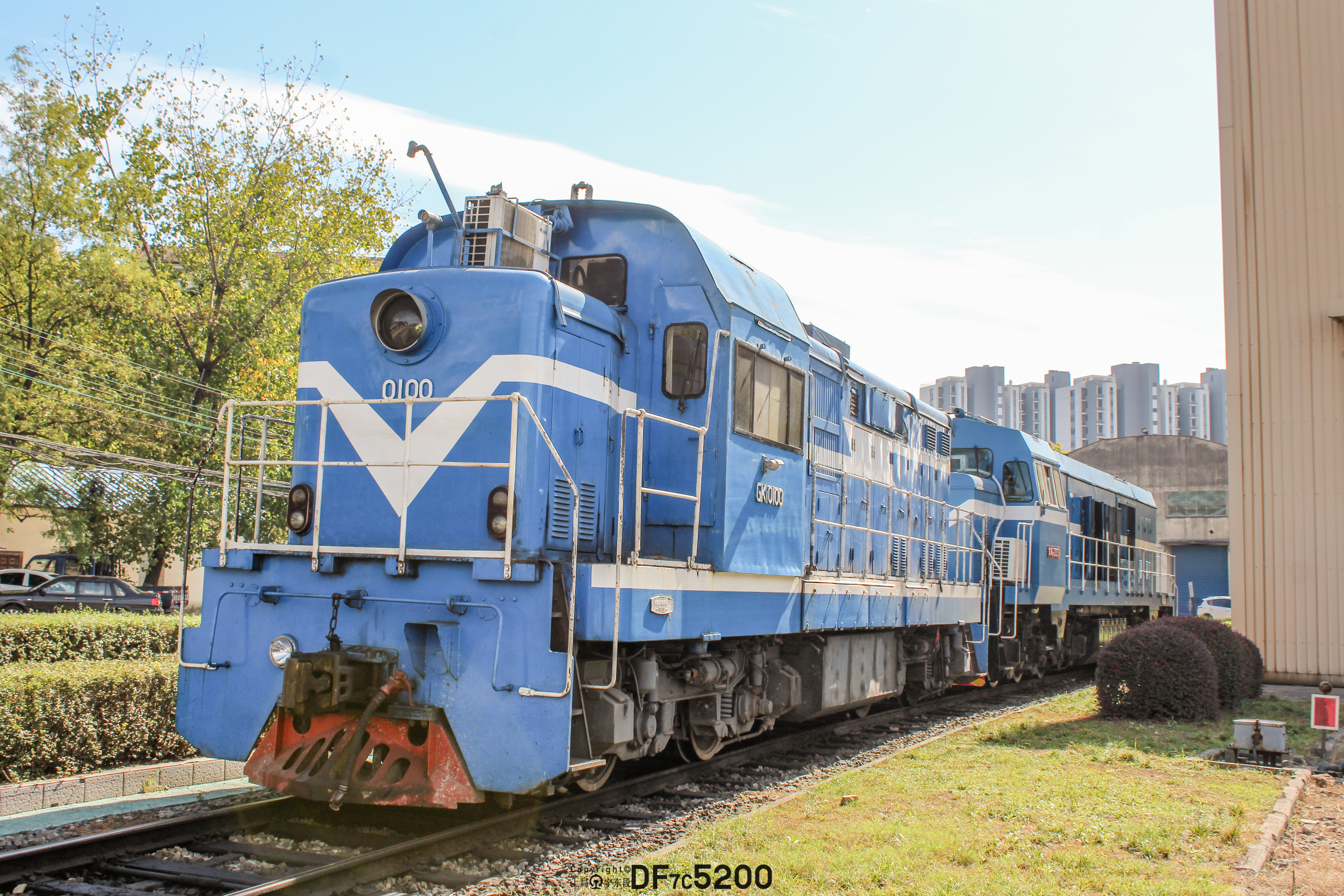 上海梅山钢铁购买的GK1型内燃机车